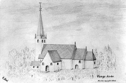 Gamle Vang kirke på Ridabu, som brant i 1804